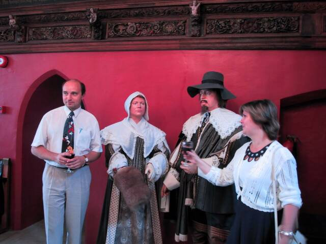 Guntis Valneris koos abikaasa Antraga Tallinna Raekojas.